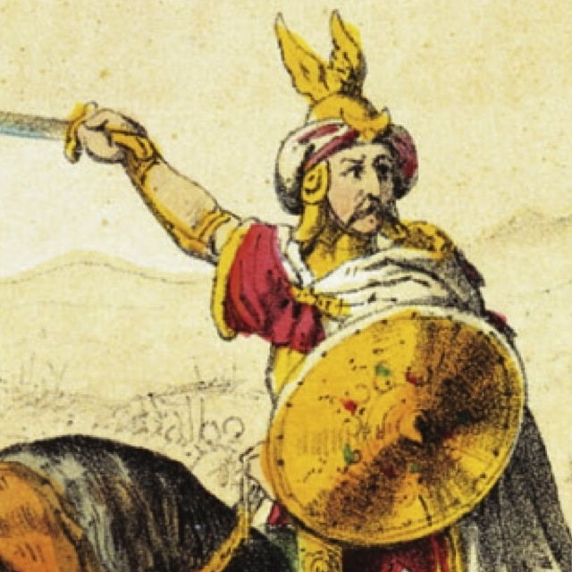 Illustration allemande du XIXe siècle (détail).